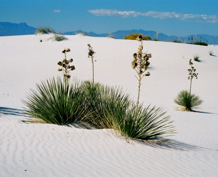 White Sands National Monument